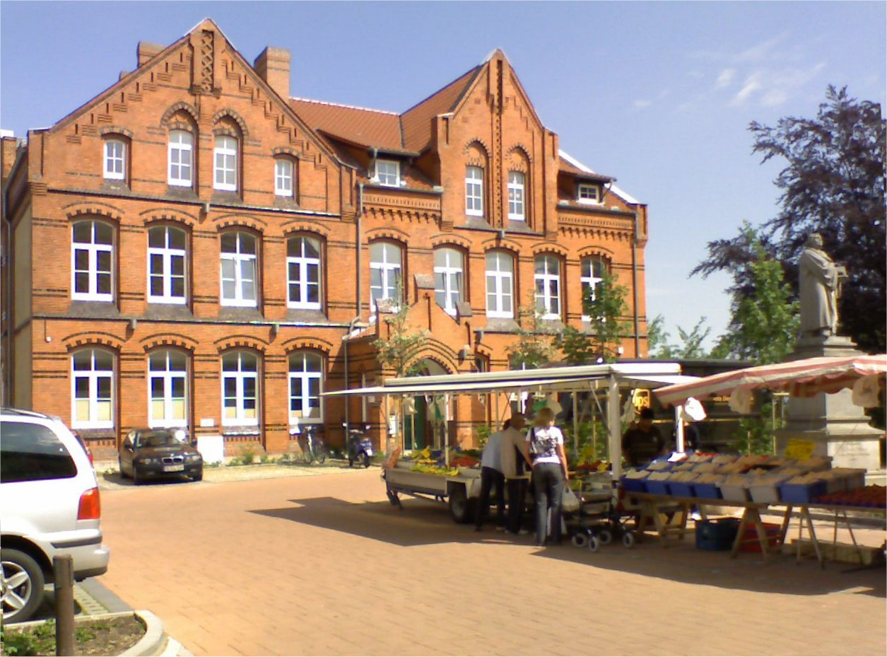 Der Marktplatz in Elze (Leine)